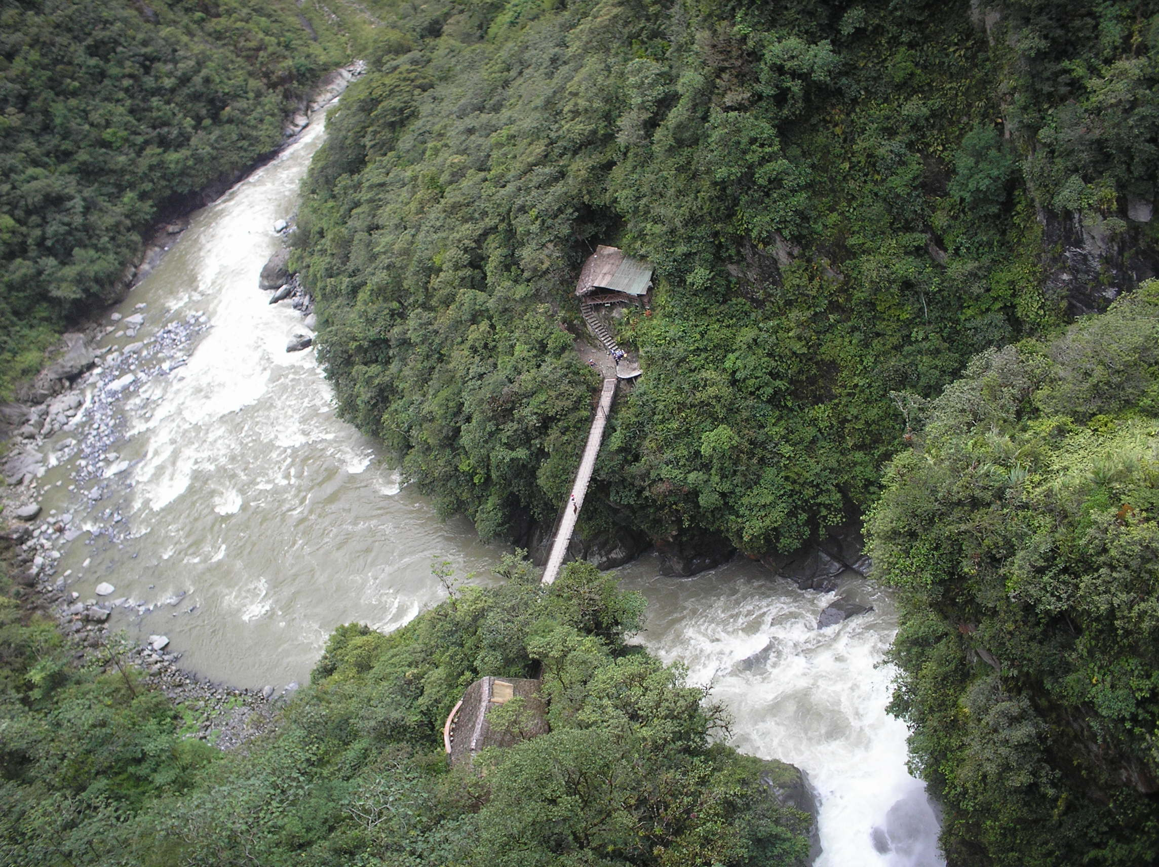 Pailón del Diablo